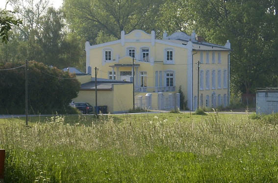 Der Viereggenhof in Wismar. Hauptsitz des Godewind Verlag.